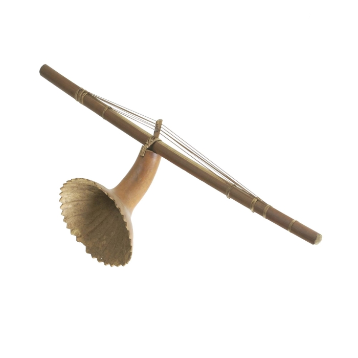 Deze stokciter bestaat uit een rechte stok gemaakt van de hoofdnerf van een palmbladsoort. Er zijn 3 snaren van de palmhuid afgeschild, die in het midden door een houten kam worden opgehouden. Hoewel dit instrument meestal als een harp-citer wordt geclassificeerd, is het eigenlijk een gewone (stok) citer, met een hoge kam. Omdat de snaren van hetzelfde materiaal zijn als de drager -in dit geval palmblad- wordt dit een 'idiochord' genoemd. De snaren zijn aan de uiteinden omwikkeld met ringen van palmvezeltouw om het instrument te stemmen. Onder de stok is een kalebas klankkast met een gekartelde rand bevestigd; deze wordt bij het bespelen tegen de borst gehouden waardoor deze mee resoneert.